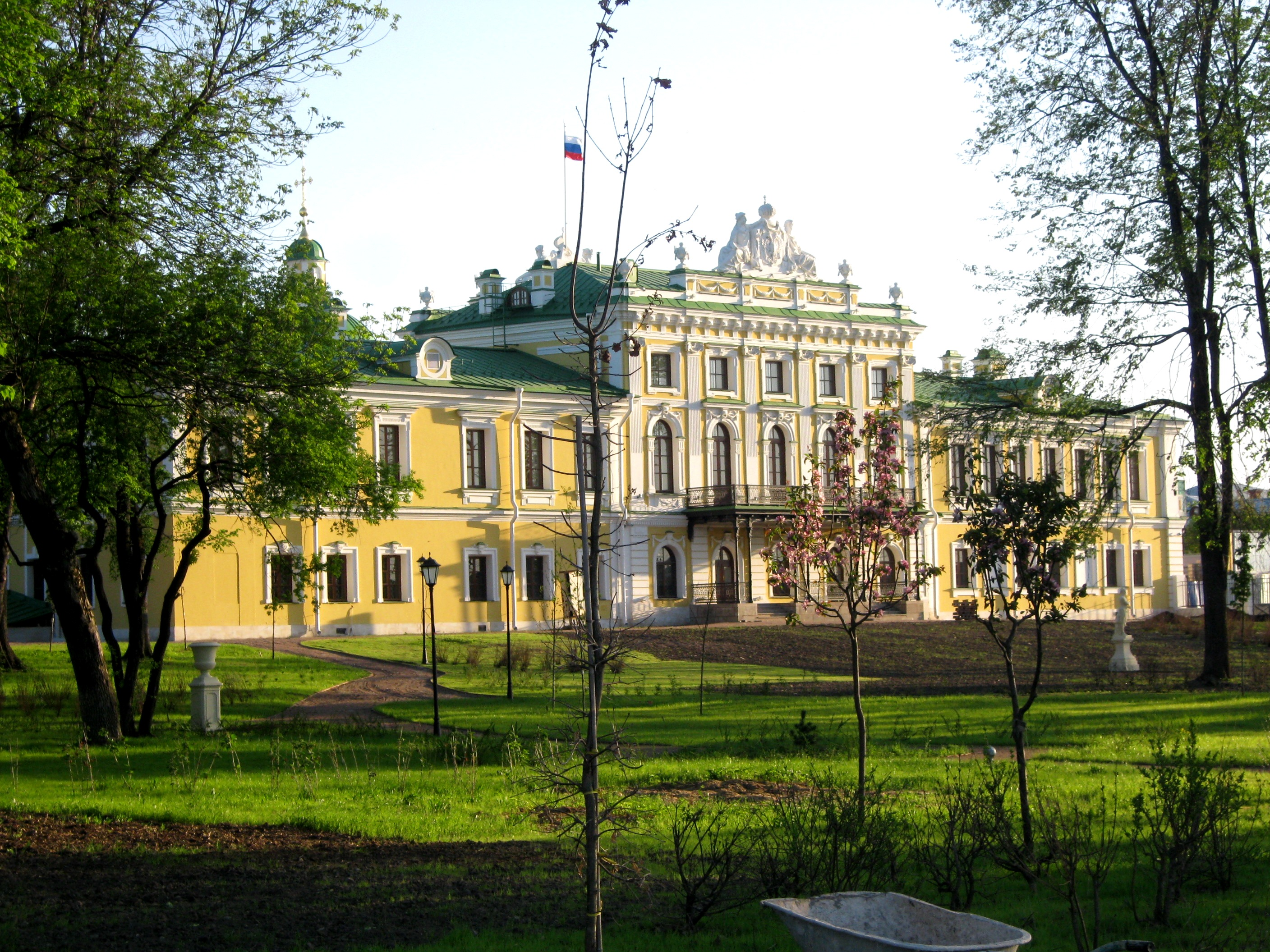 Travel Palace in Tver (2016)